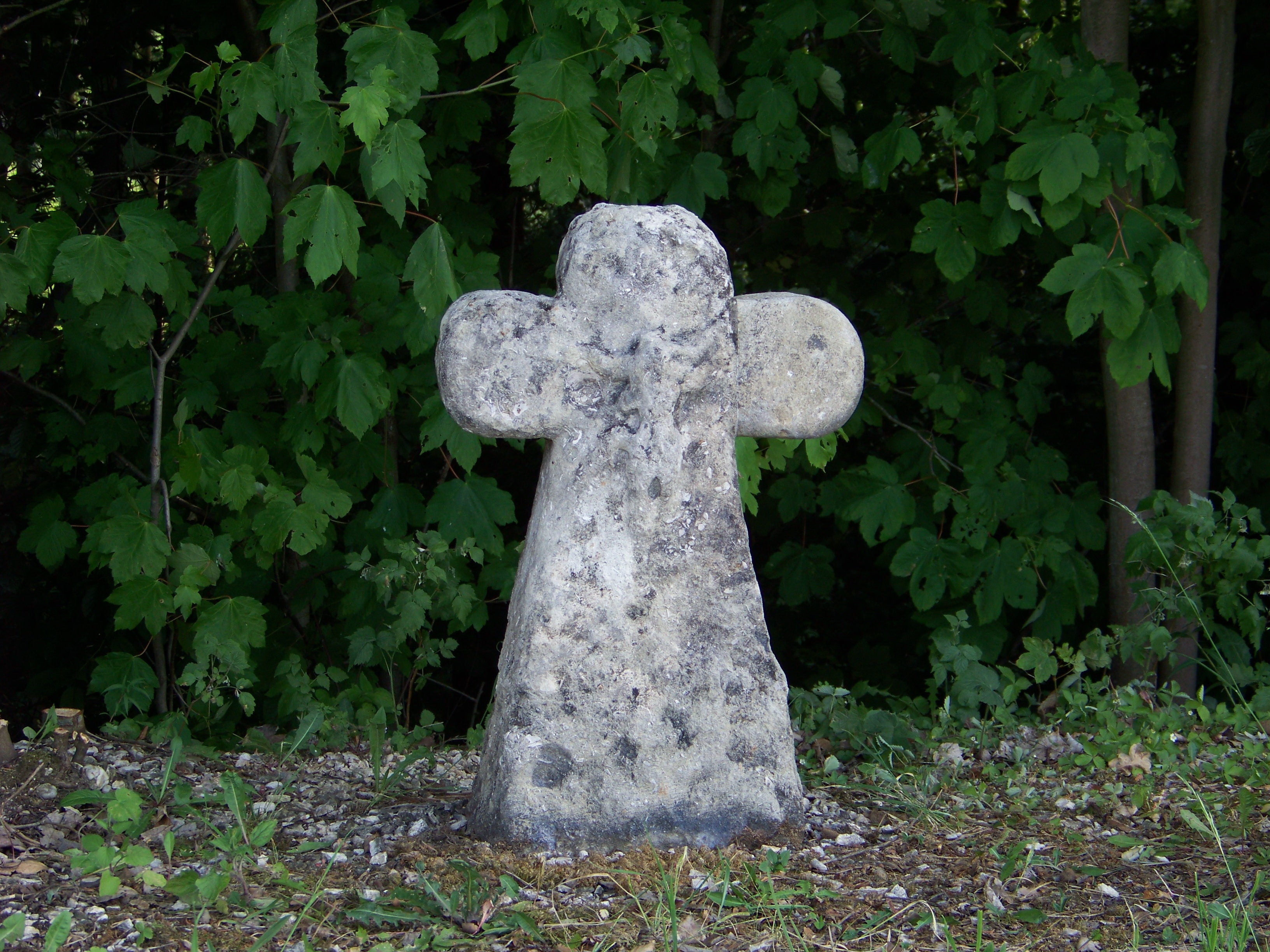 Kreuz aus Muschelkalk an der Straße Haader - Franken. Höhe 75cm, Querbalken 48cm. Über dem Kruzifix sind noch drei Buchstaben INR erhalten. Auf der Rückseite ist die Jahreszahl 1603 eingemeißelt. Über die Herkunft und Bedeutung wird gerätselt. Sühnekreuz oder Grenzstein des Reichsstifts Niedermünster? In der Bevölkerung ist das Kreuz auch als "Hunnenkreuz" bekannt. Mit dem Reitervolk hat das Kreuz absolut nichts zu tun. Möglichweise handelt es sich dabei um die Verballhornung eines Familiennamens. Das Kreuz wurde bei einem US Manöver um 1960 durch einen Panzer beschädigt und zwischendurch im Feuerwehrgerätehaus in Haader gelagert. 1971 setzte es Konrad Stadler aus Hofkirchen an seinen ursprünglichen Platz am Waldrand. Die ArGe Naherholung mittleres Labertal e.V. ließ 1998 den beschädigten Querbalken von einem Steinmetz ergänzen und den Platz durch eine Aufschüttung erweitern. Am 3. Mai 1998 erhielt das Kreuz bei einem Festakt den kirchlichen Segen.